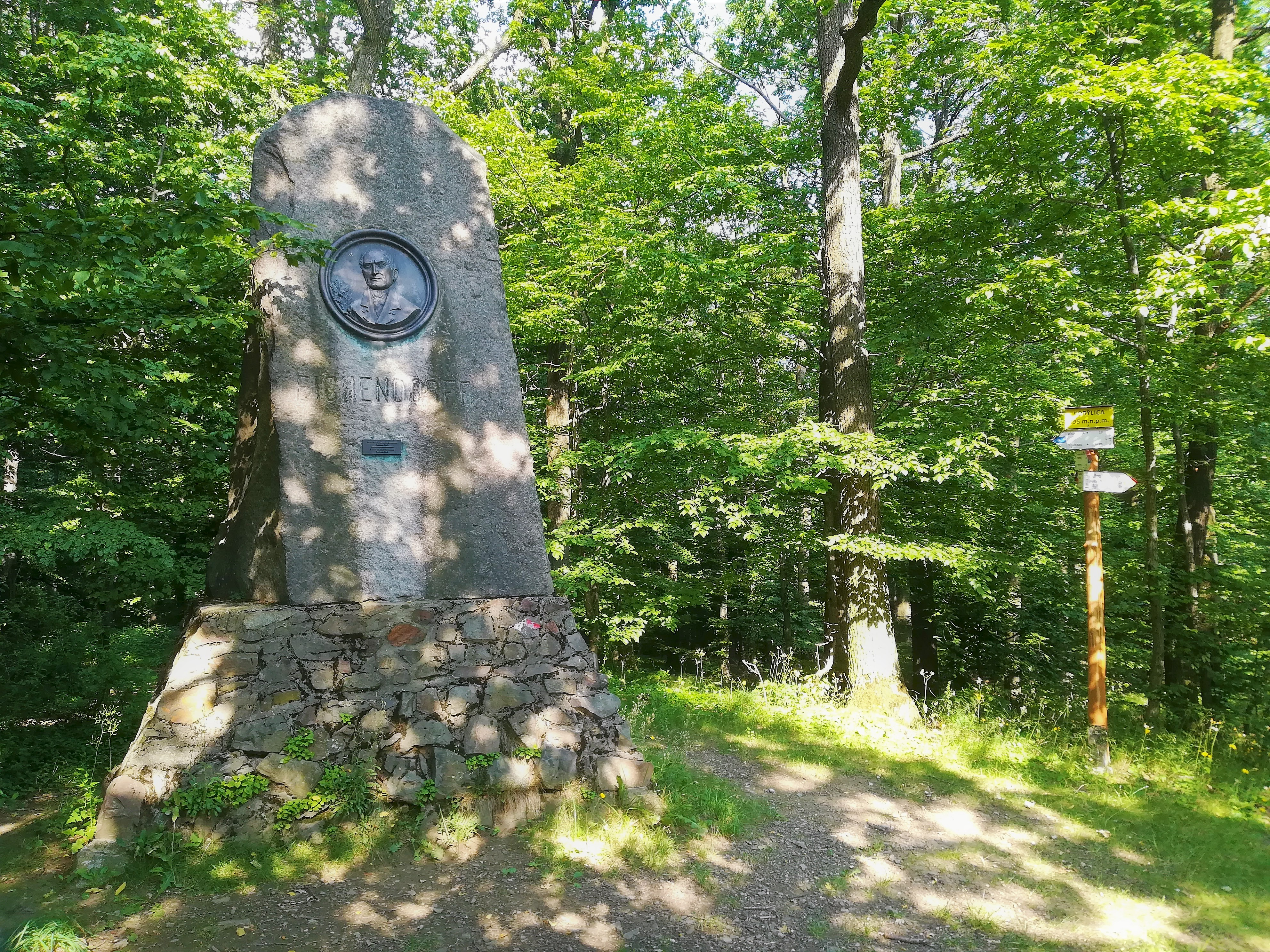 Pomnik J. v. Eichendorffa na Kobylicy w Dębowcu.